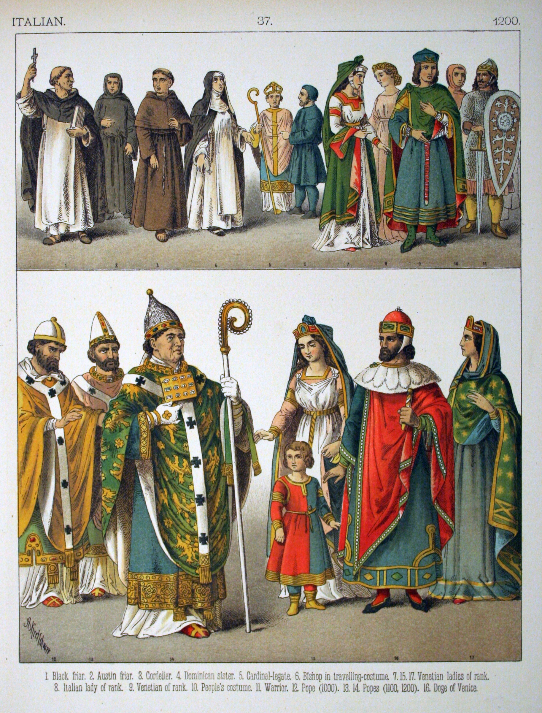 1200, Italian